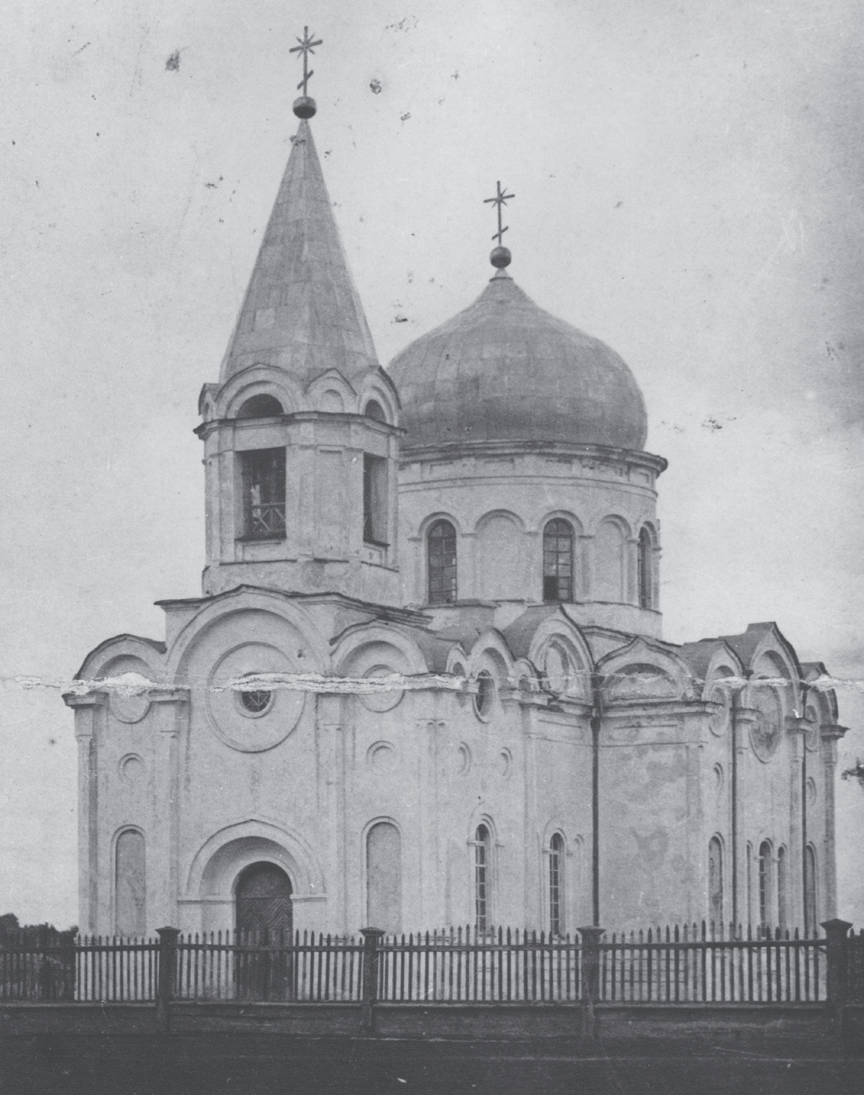 Беларуская (тарашкевіца): Горкі (Horki), Казімераўская Слабада (Kazimieraŭskaja Słabada). Царква